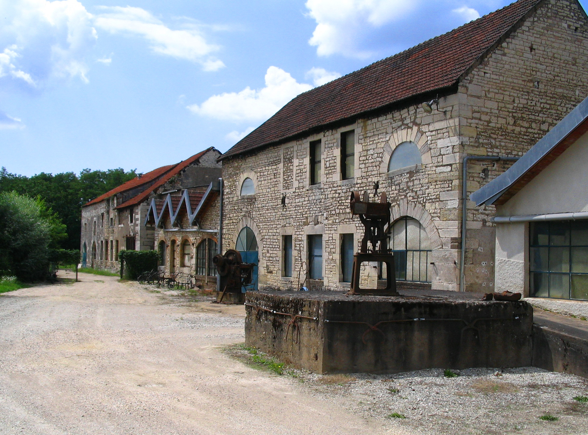 Vue des Forges de Pesmes, bâtiment des hauts-fourneaux - Pesmes - Haute-Sâone - France